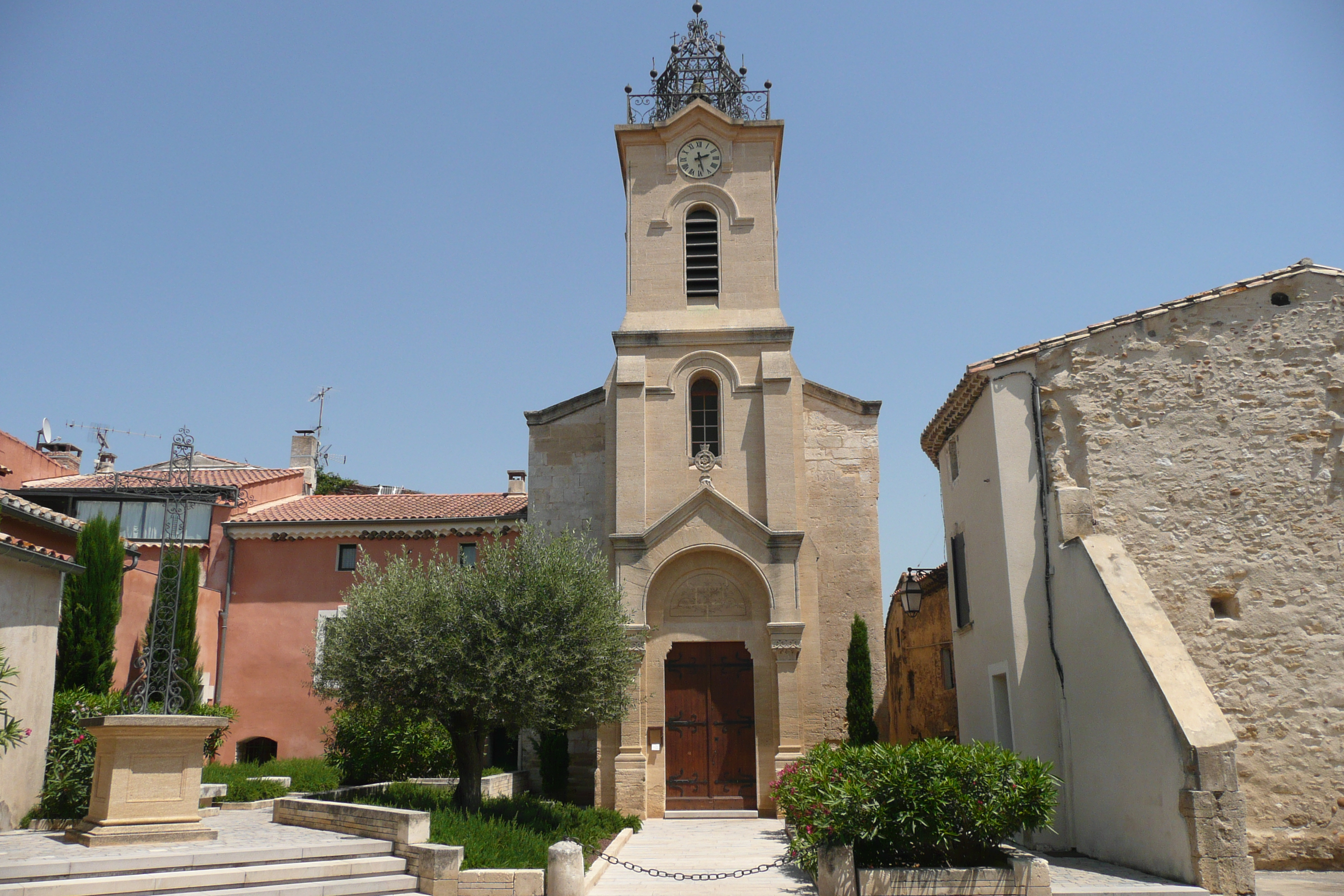 Eglise à Domazan.